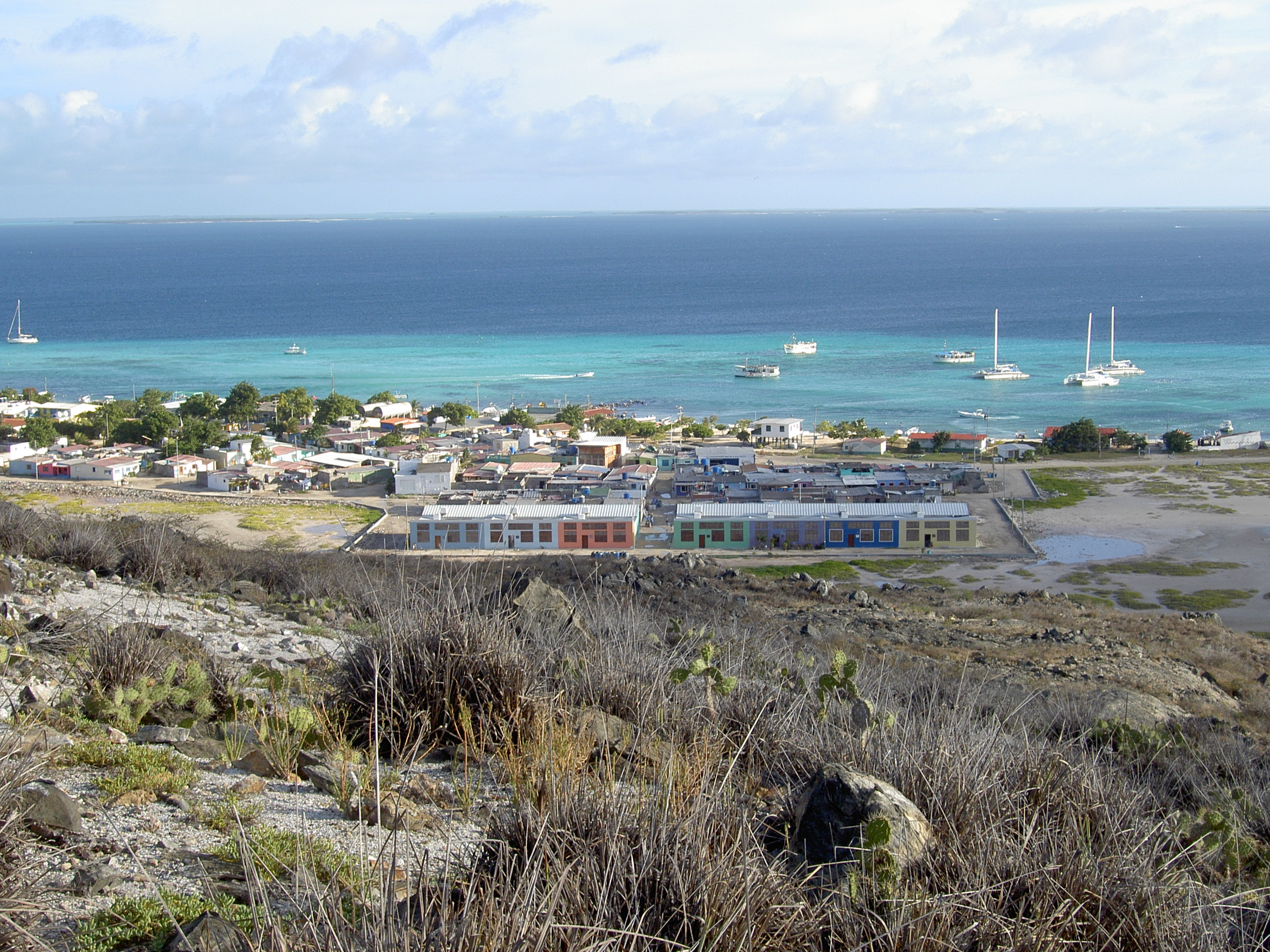 Vista de una parte del Poblado del Gran Roque y de la playa desde el viejo faro mirando al SW. Autor: Pedro Sánchez (PSE)